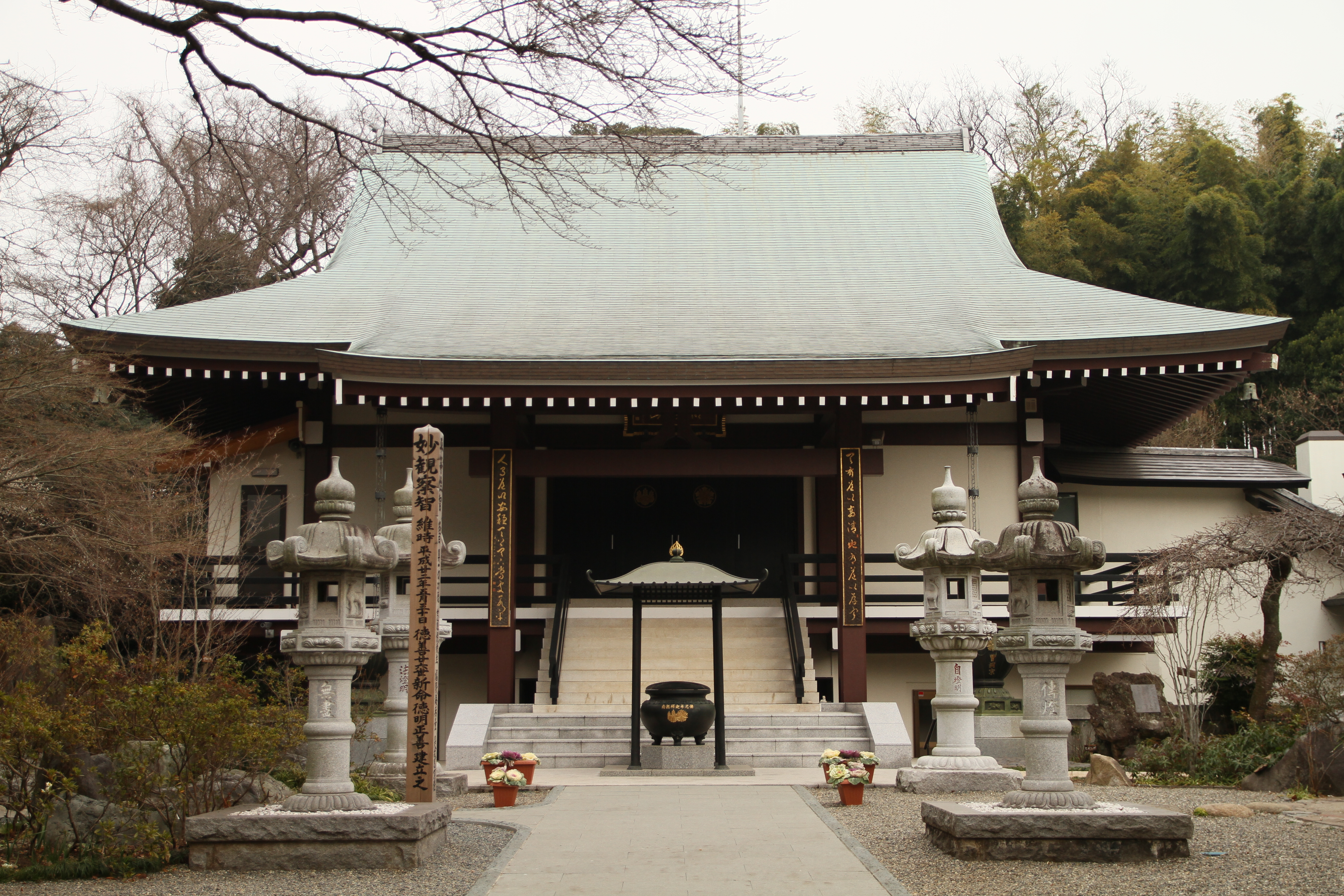 徳善寺（横浜市瀬谷区）本堂